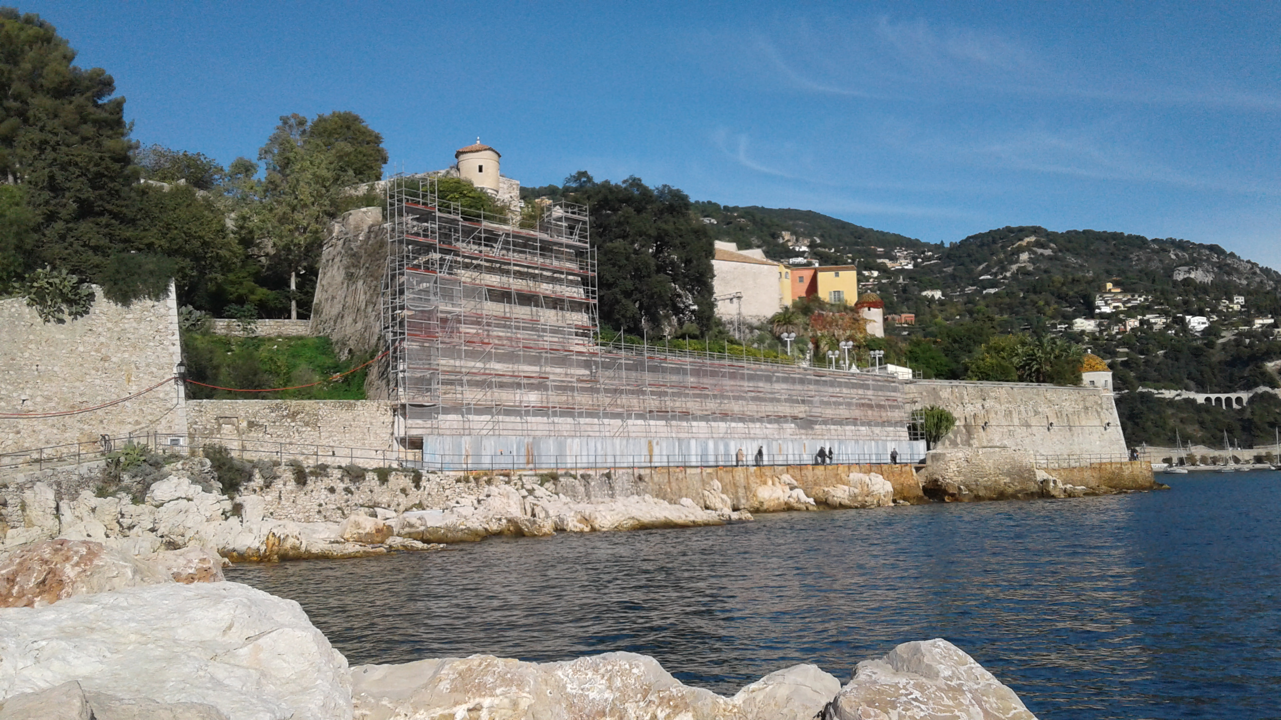 Travaux de restauration de la Citadelle Saint-Elme de Villefranche-sur-Mer (Alpes-Maritimes, France) qui ont débuté en novembre 2019